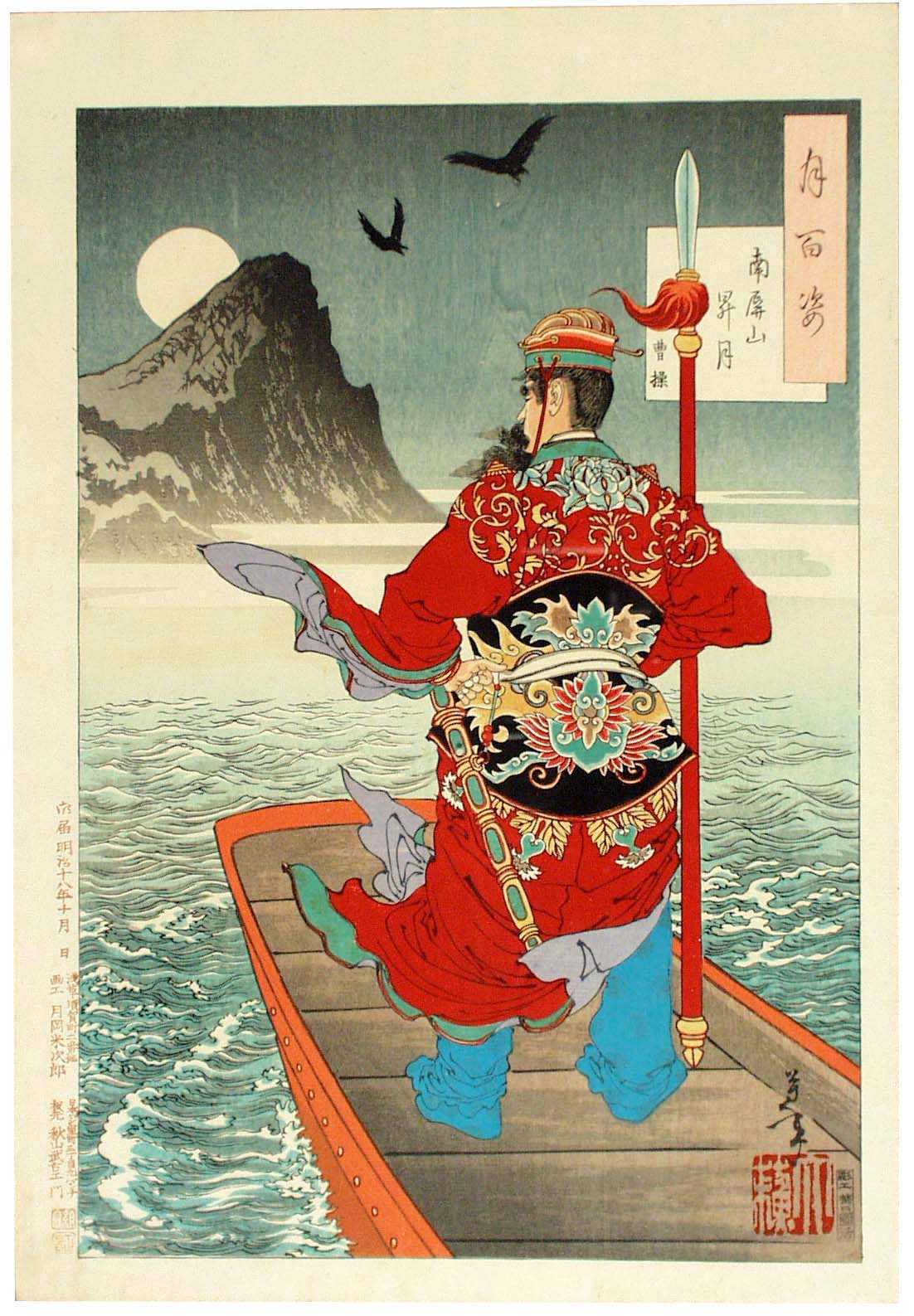 Levé de lune sur le Mont Nanping contemplé par Cao Cao